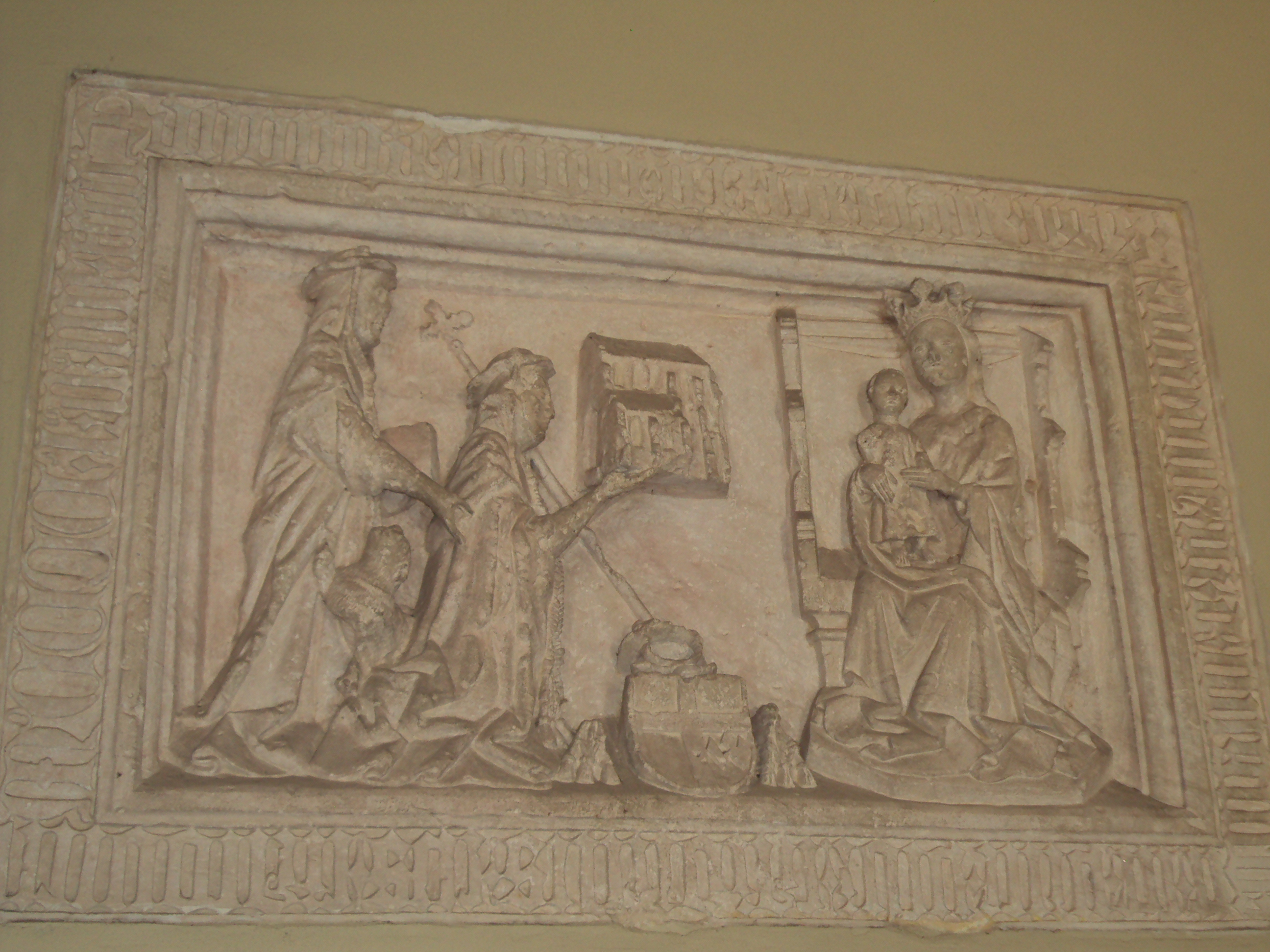 Bodzentyn kościół - tablica erekcyjna Zbigniewa Oleśnickiego